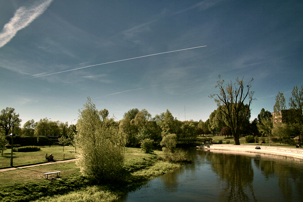 Brodnica